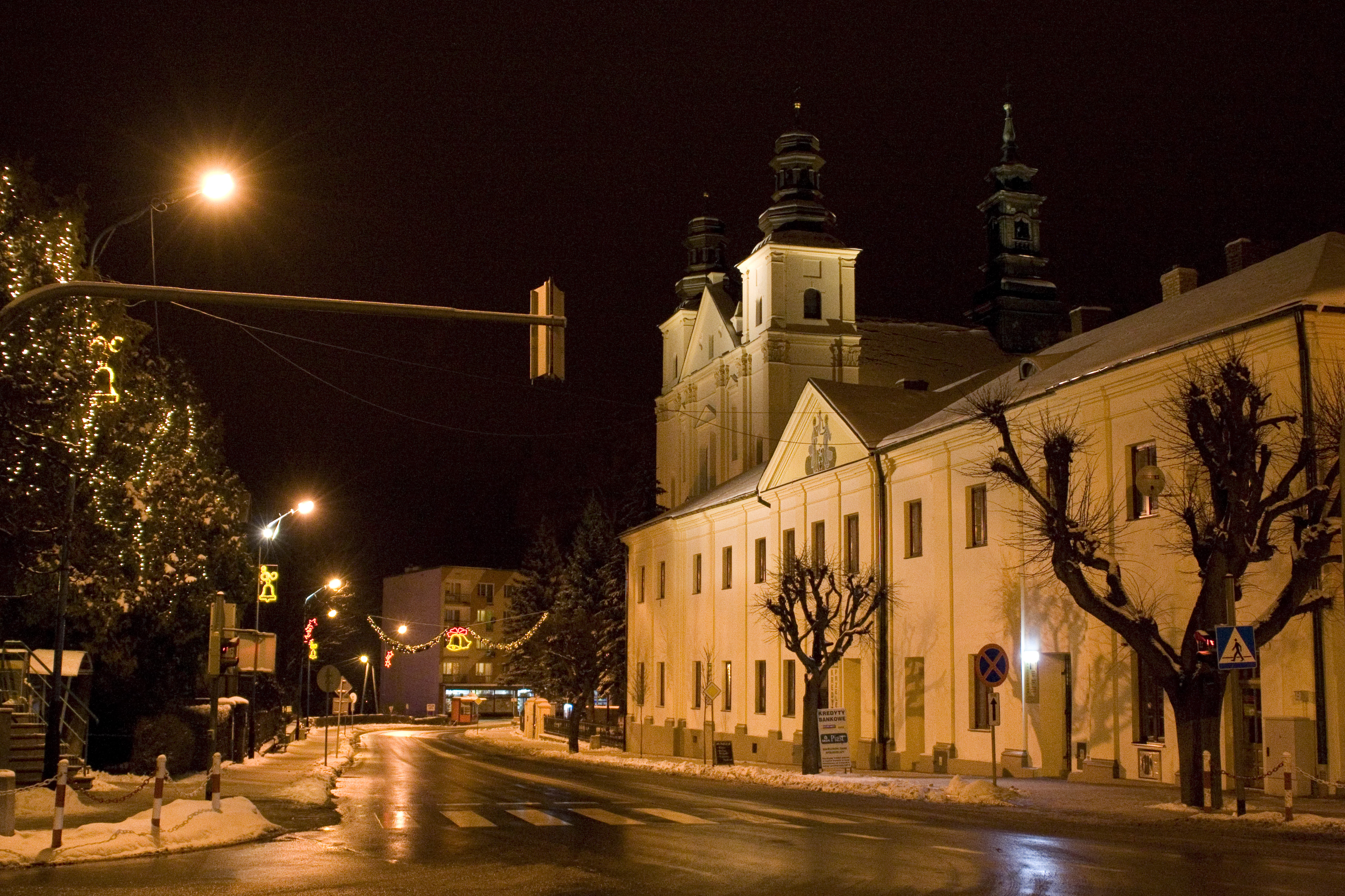 Główne skrzyżowanie w Brzozowie nocą. Widok na budynek dawnego seminarium misjonarzy z XVIII w. oraz barokową kolegiatę.